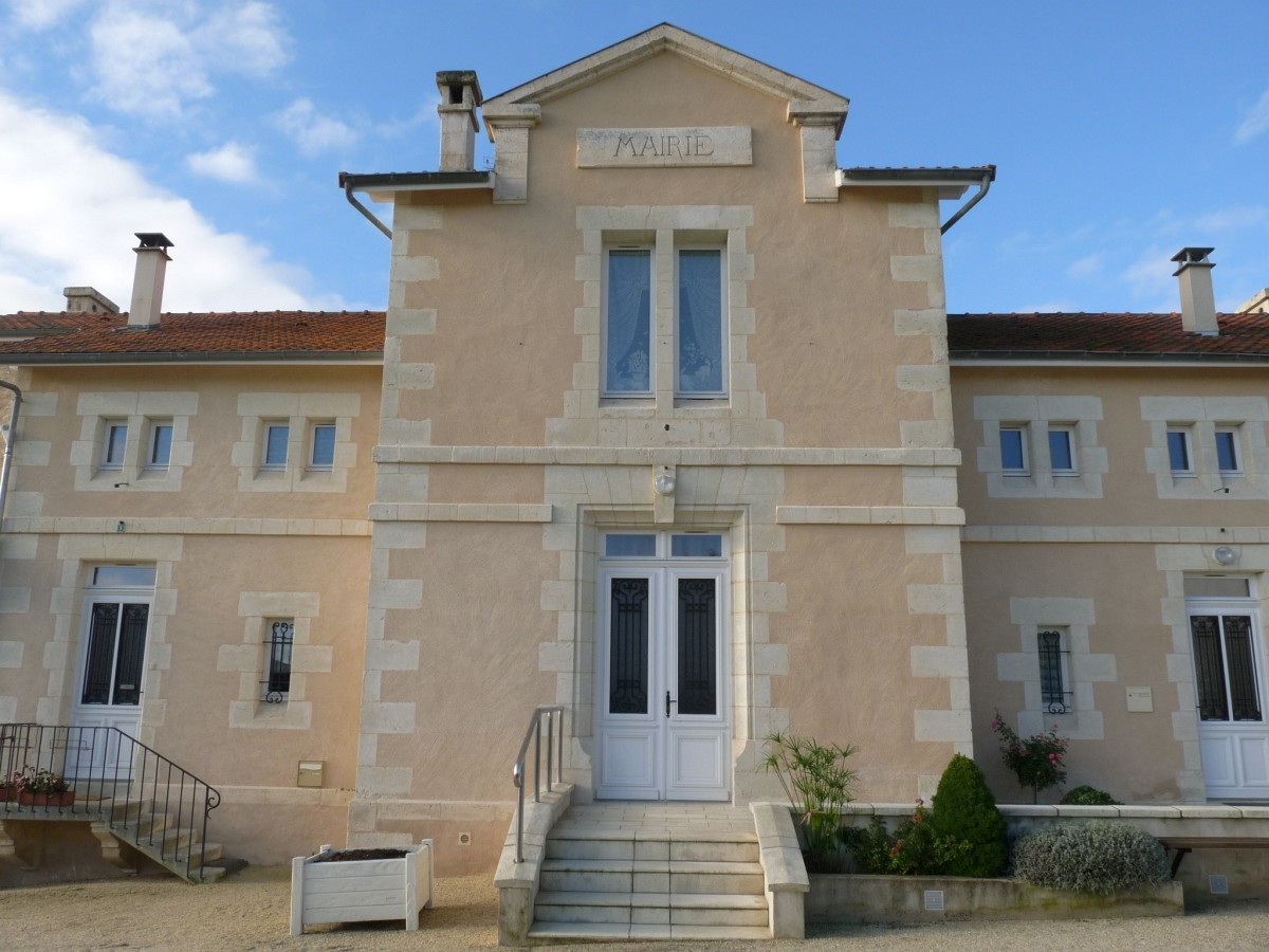 Mairie d'Orignolles, Charente-Maritime, France